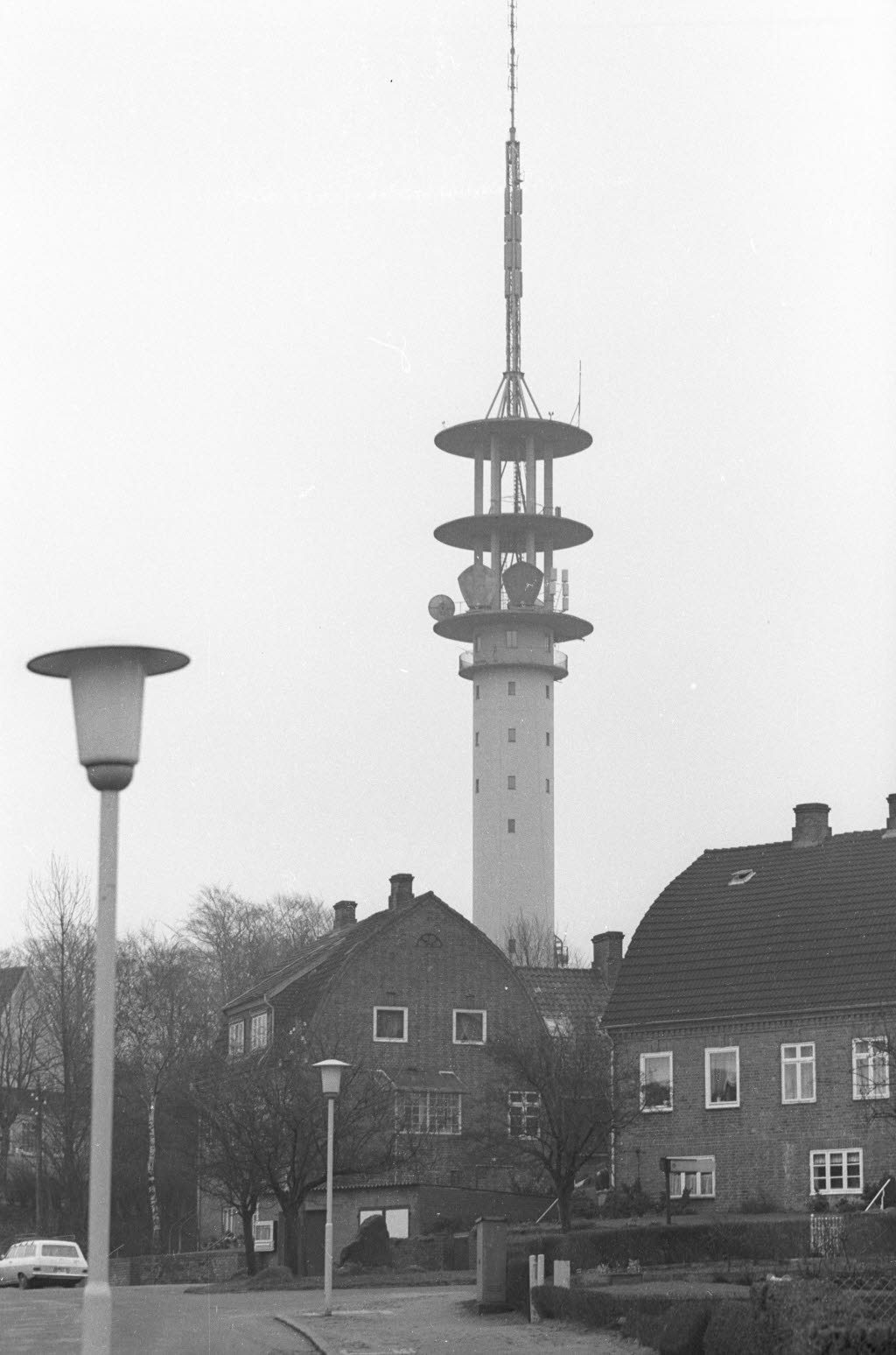 Blick vom Krummbogen.